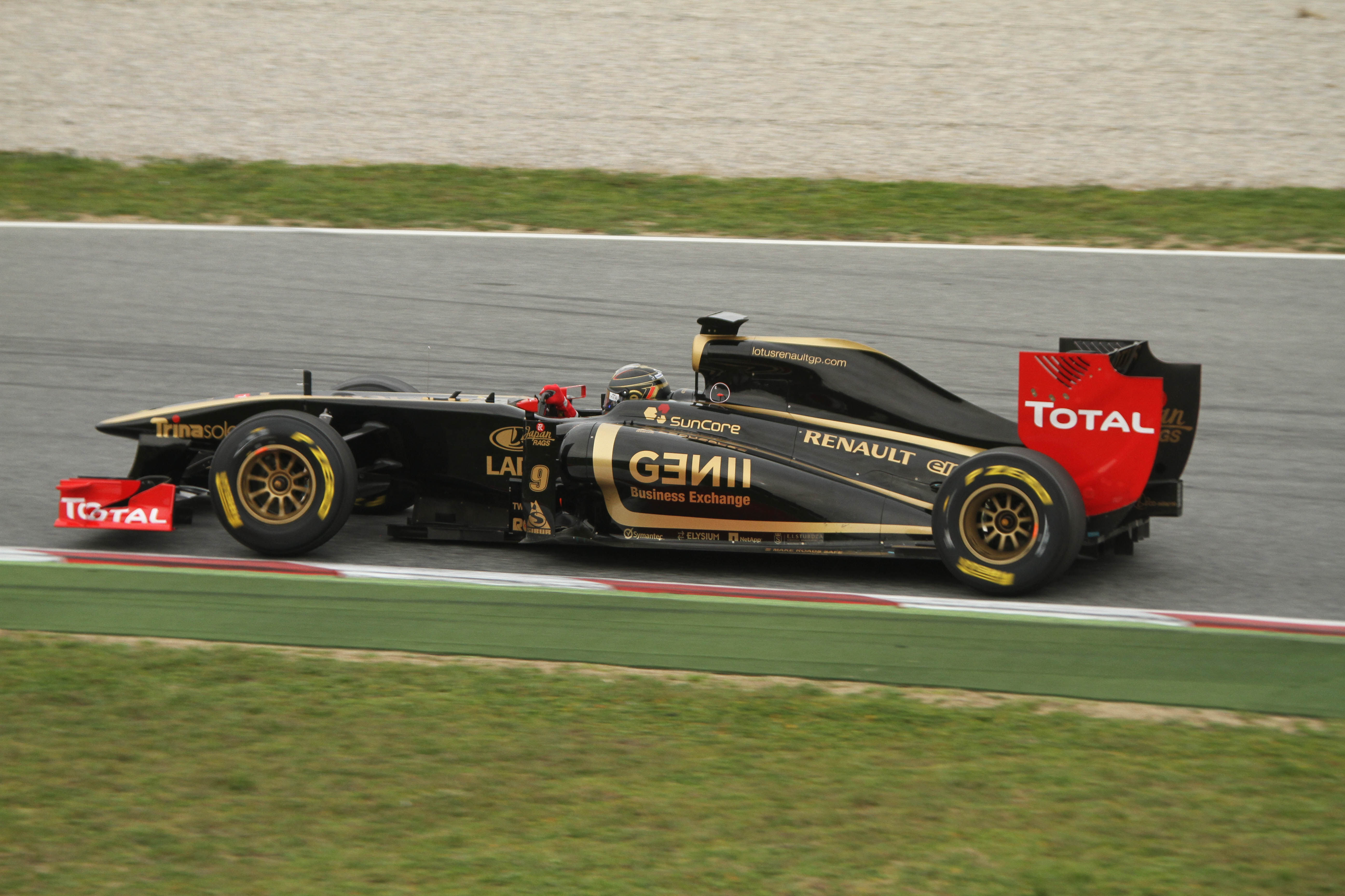 Renault